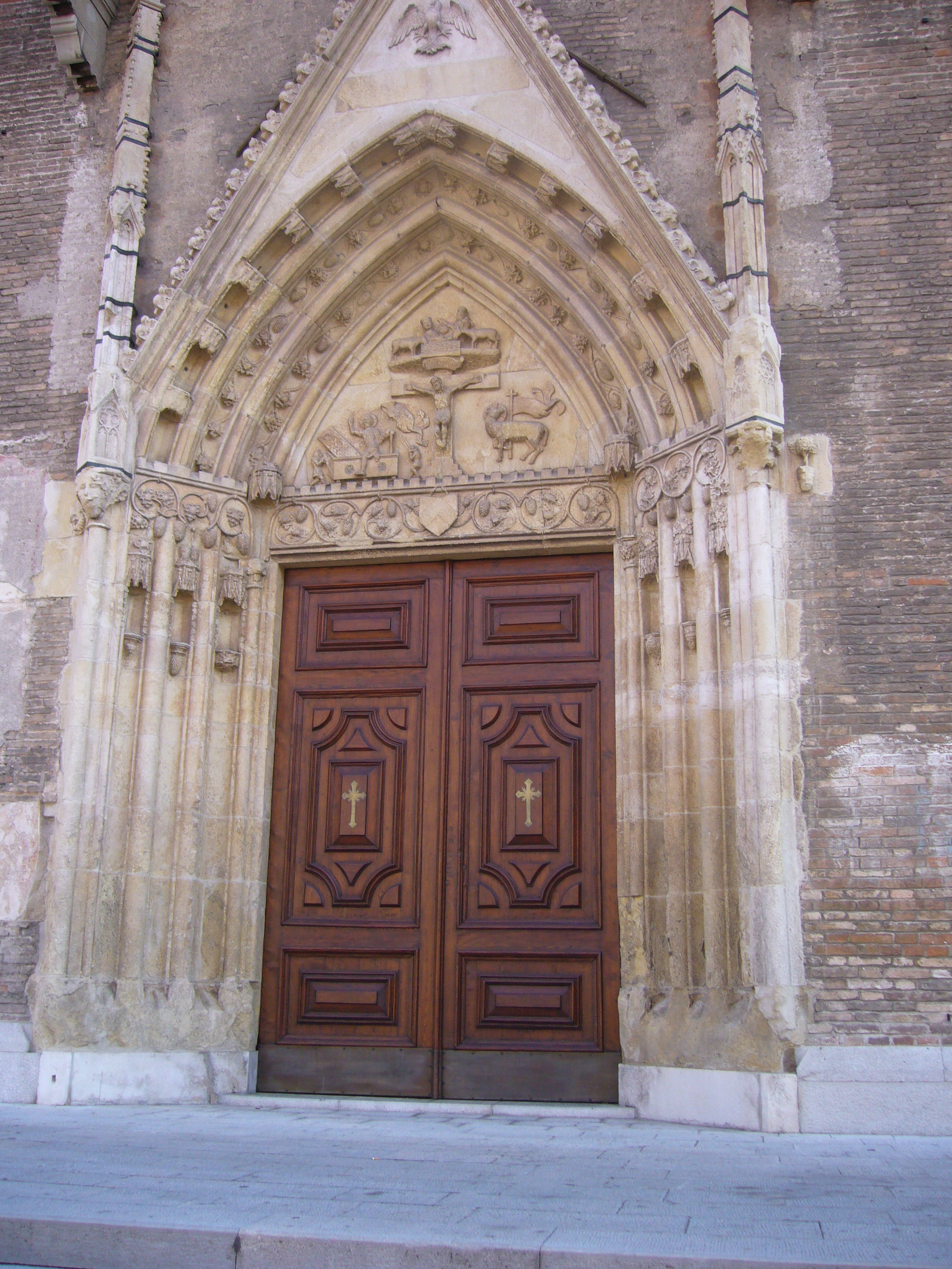 Kathedraal van Udine, voordeur